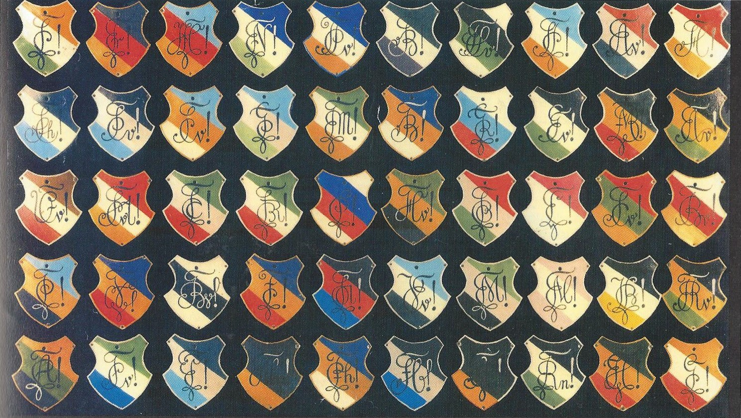 Farbenschilde und Zirkel der Corps im Rudolstädter Senioren-Convent 1930; Annotierungen nach Recherchen von Heinrich Diedler, Stade. Von den heute noch offenen Corps fehlt Hermunduria Leipzig zu Mannheim, 1926 in den RSC recipiert.